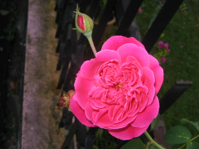 Mawar kampung 2005 @Mohamed Yosri